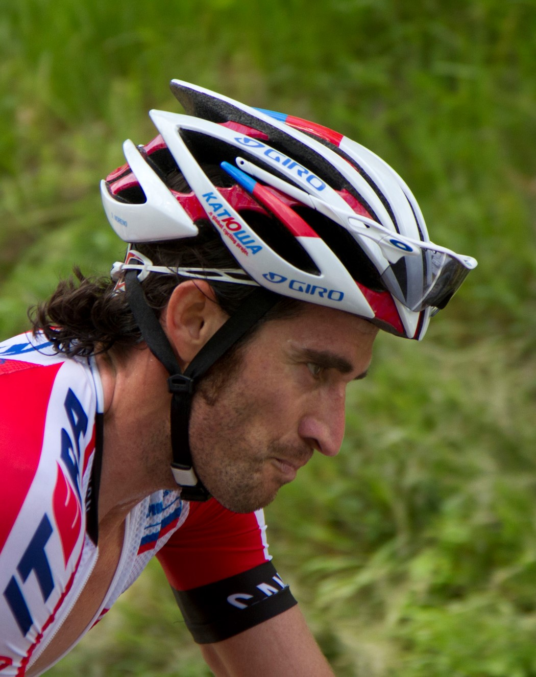 311 danny moreno